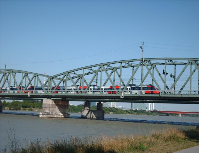 de: Nordbahnbrücke in Wien. Eisenbahnbrücke über die Donau zwischen den Schnellbahnstationen Handelskai (rechts ausserhalb des Bildes) und Floridsdorf. Blickrichtung flussabwärts. Der zweite sichtbare Brückenpfeiler gehört zur Brücke der U-Bahnlinie U6.